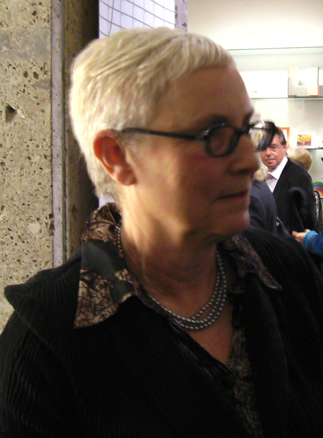 Portrait Frances Archipenko-Gray, Ehefrau von Alexander Archipenko